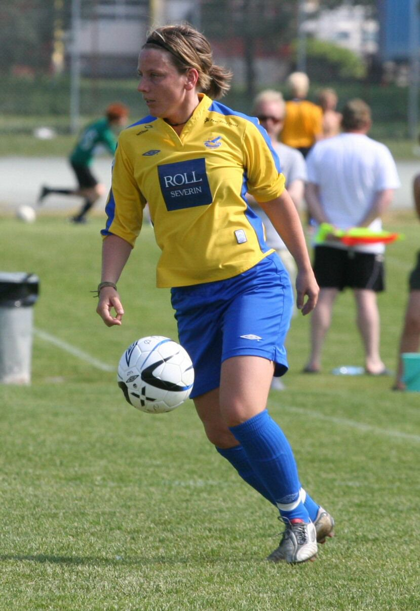 Fotballspilleren Monica Enlid